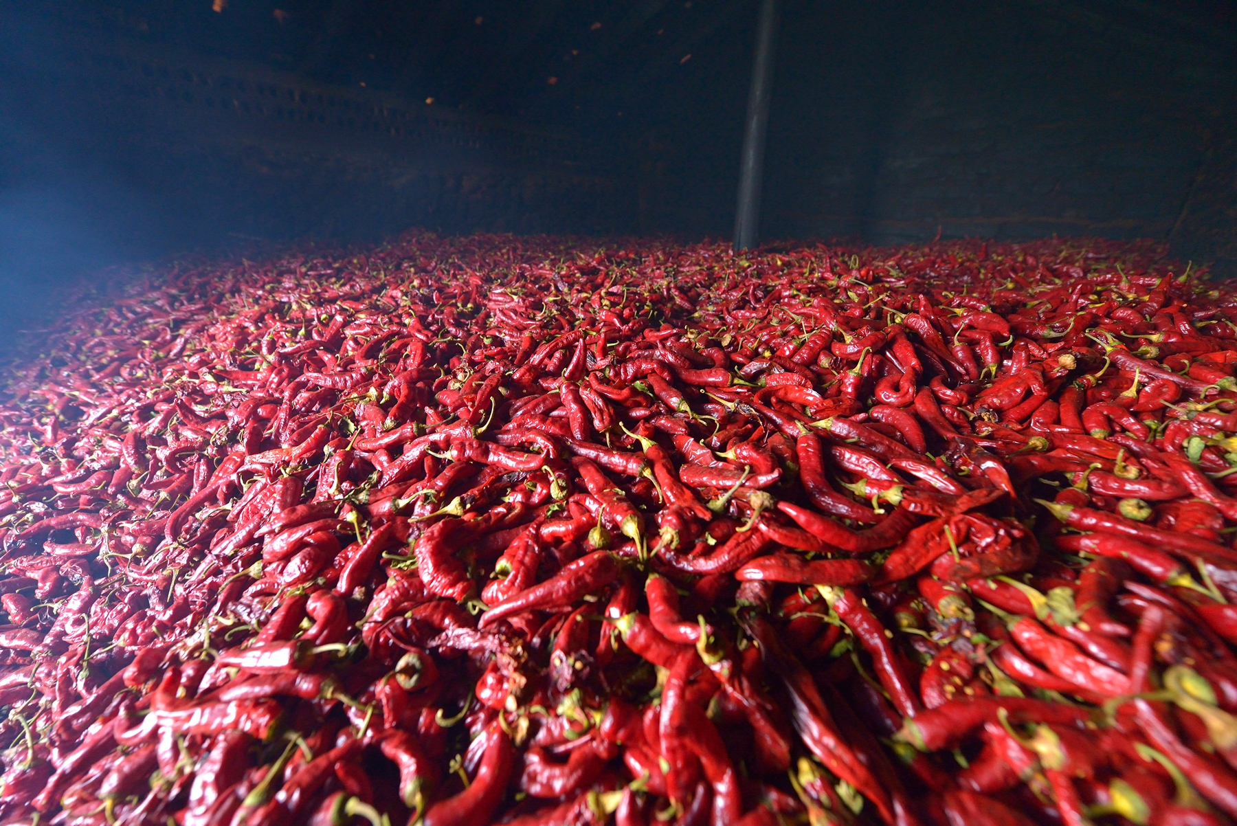 Secado con humo en sequeros tradicionales para pimentón ahumado de Candeleda